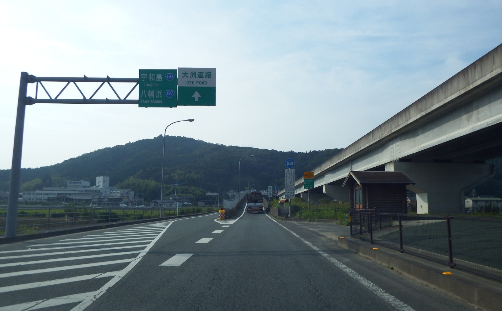 大洲北インターチェンジ入り口